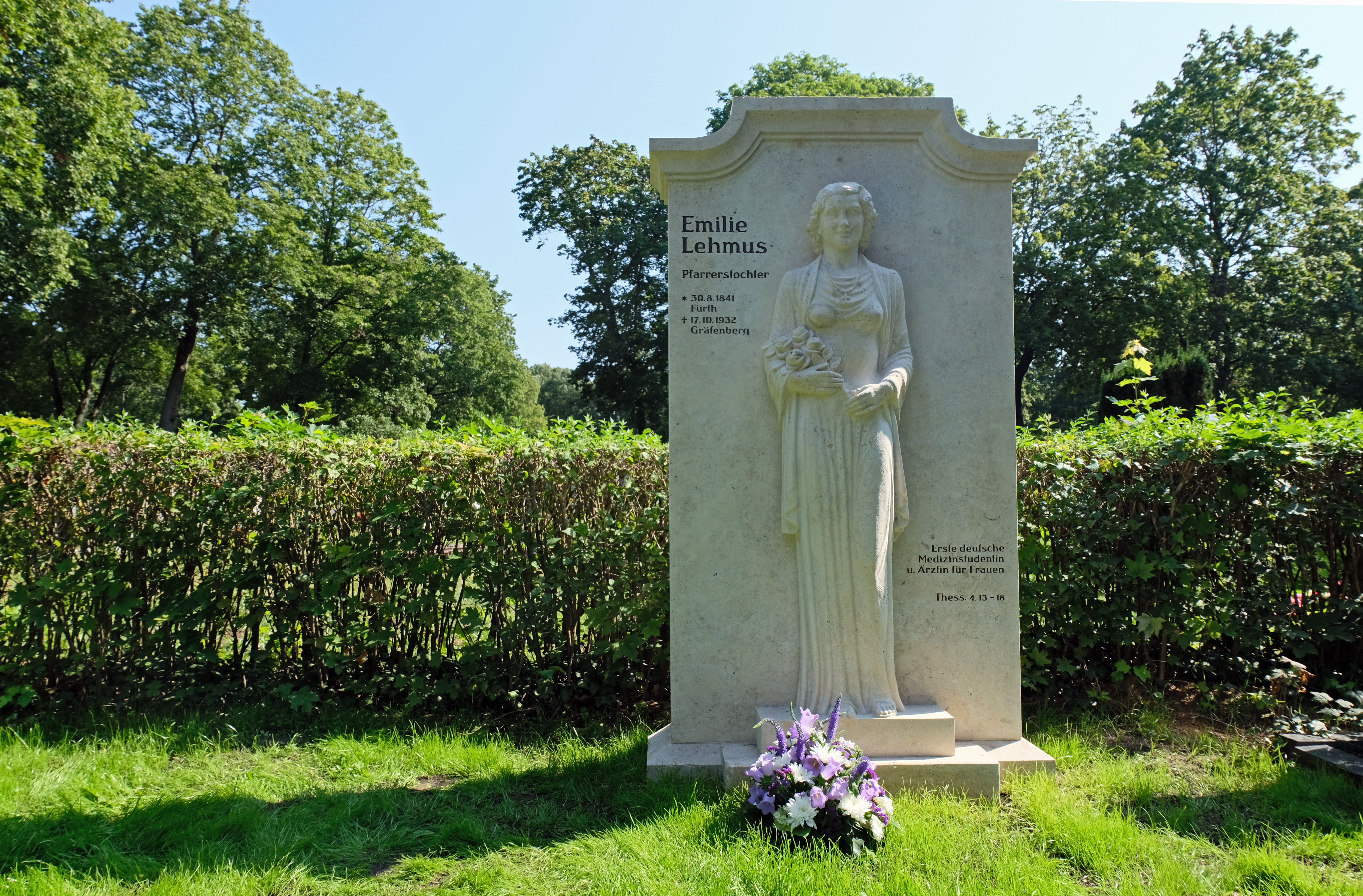 Gedenkstein für Dr. Emilie Lehmus auf dem städt. Friefhof in Fürth. Die abgebildete Person stellt lediglich eine junge Frau dar.